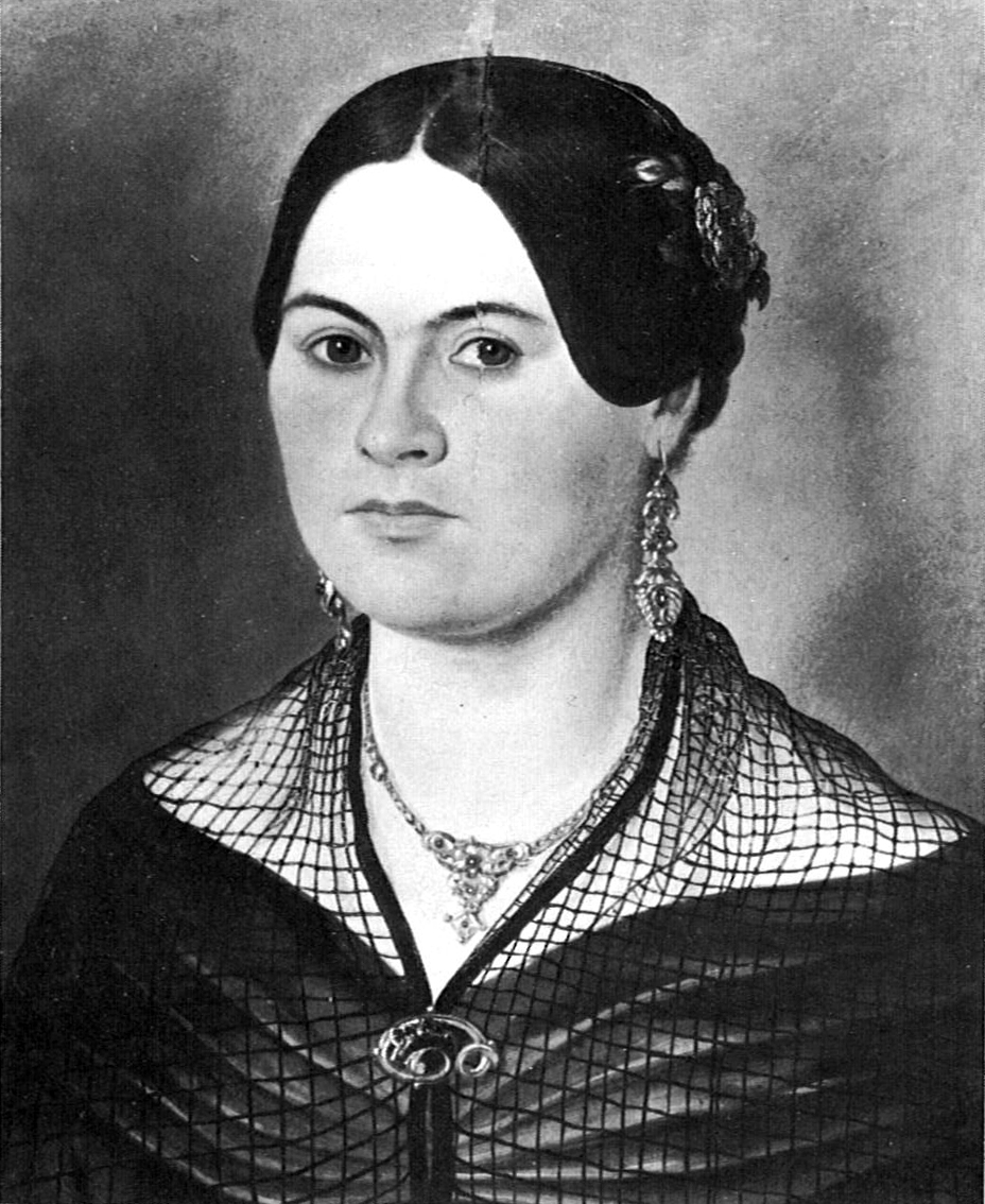 Amalie Kreuzer, zweite Ehefrau Vinzenz Kreuzers